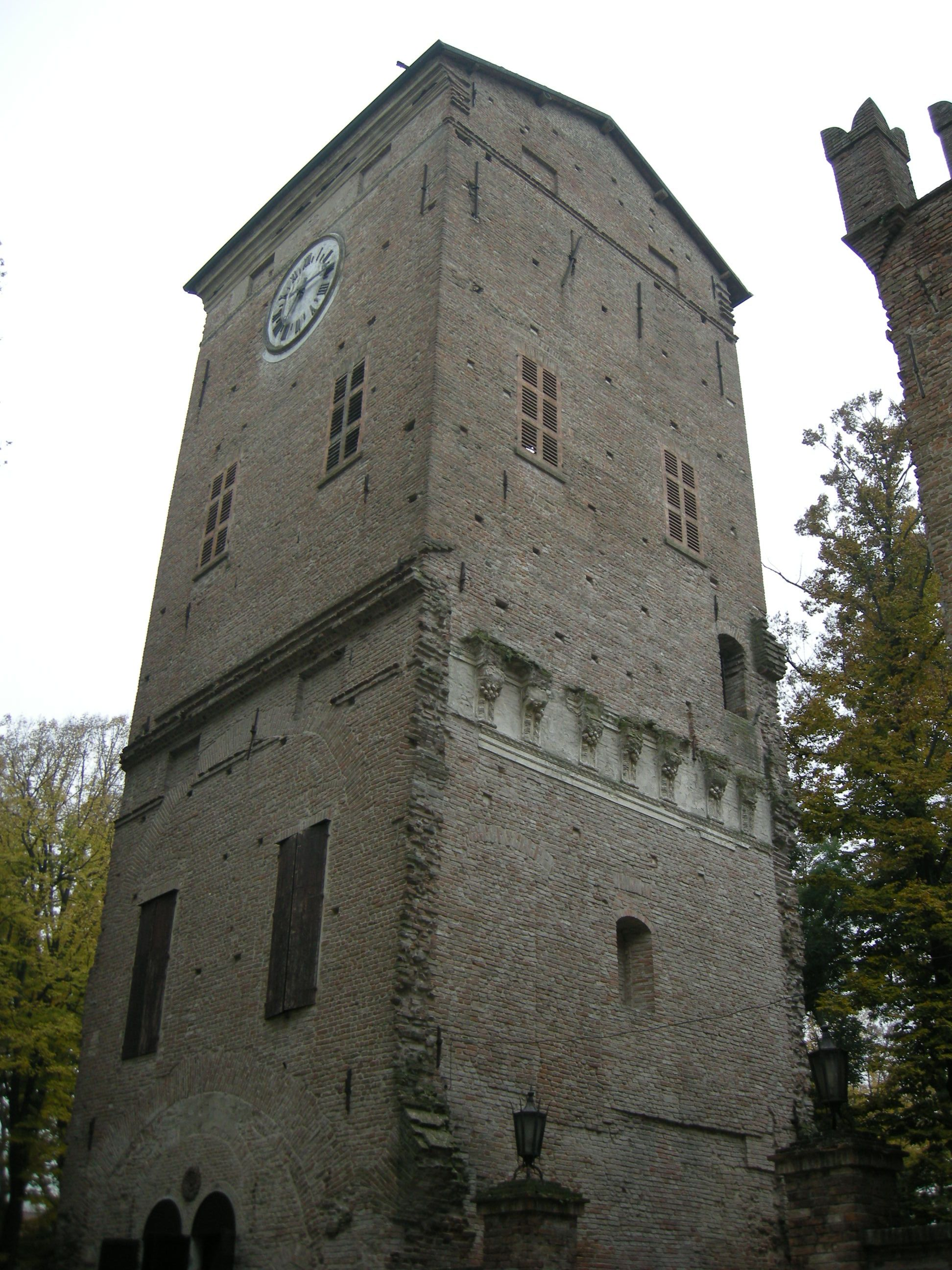 Rocca dei rossi di san secondo